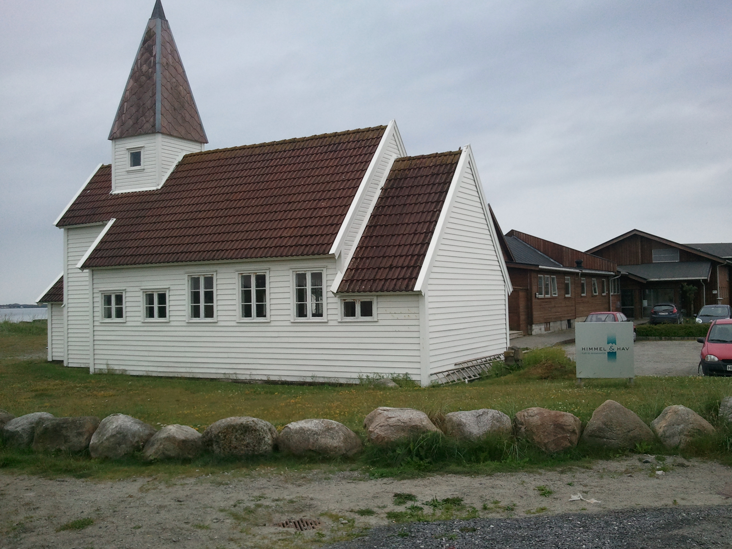 «Det lille kapellet ved havet» med leirstedet Himmel og Hav i bakgrunnen